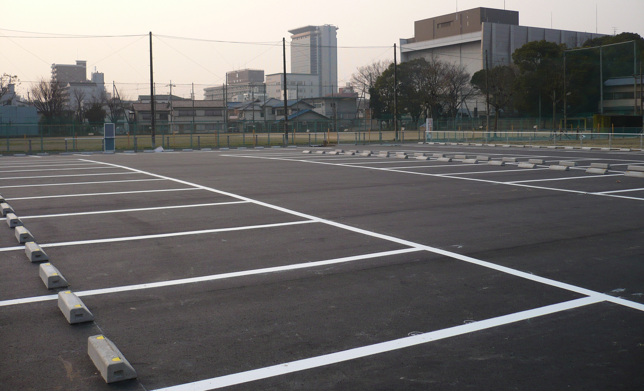 本丸、二の丸付近